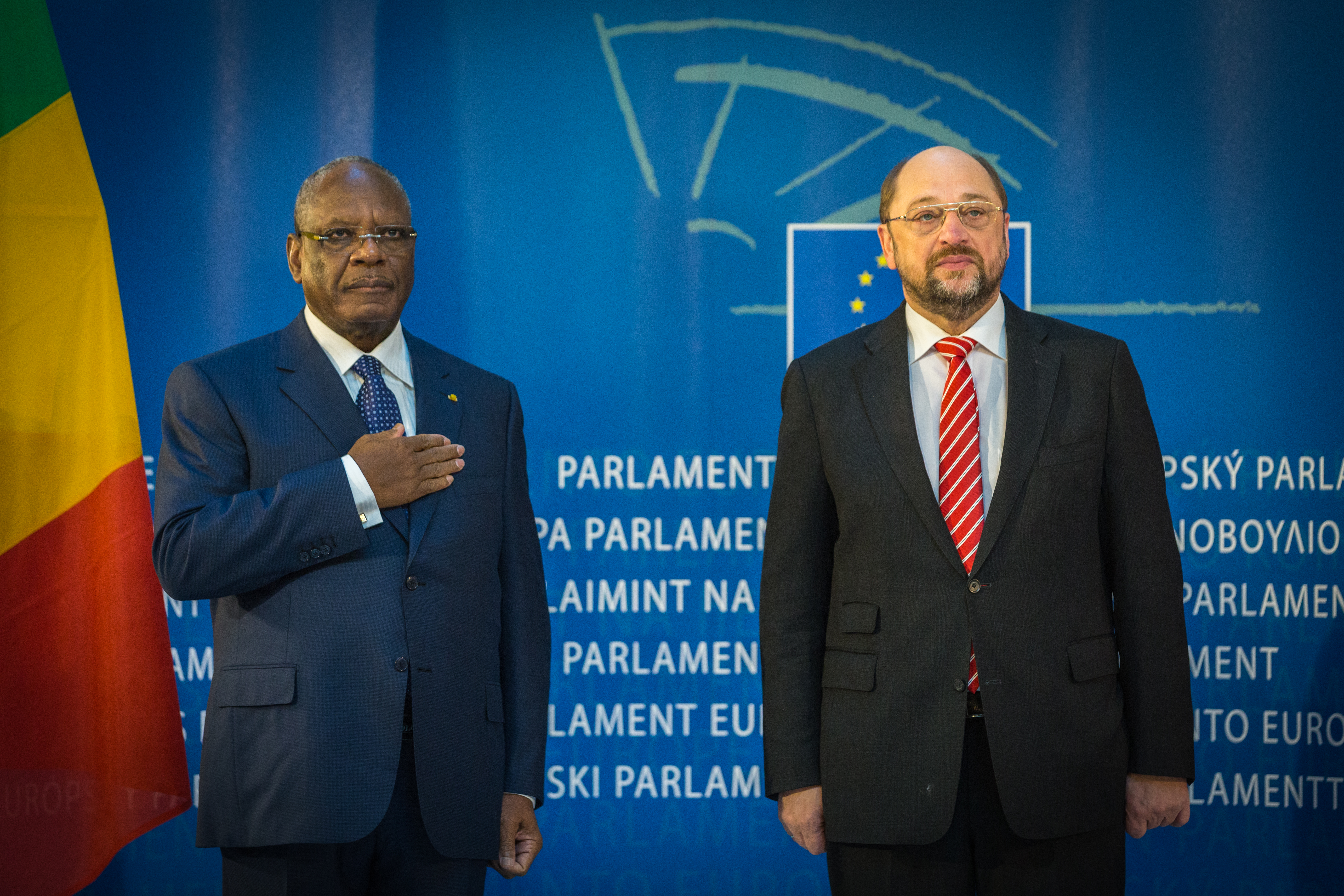 Le président de la république malienne, Ibrahim Boubacar Keïta au Parlement européen de Strasbourg le 10 décembre 2013.